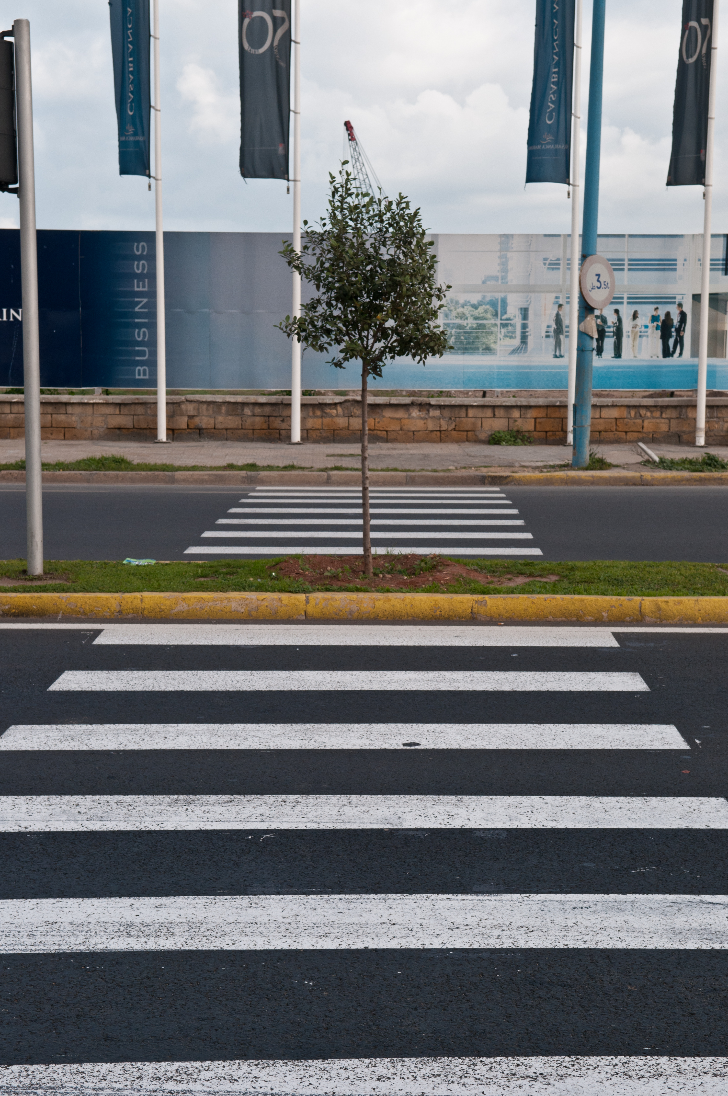 Casablanca